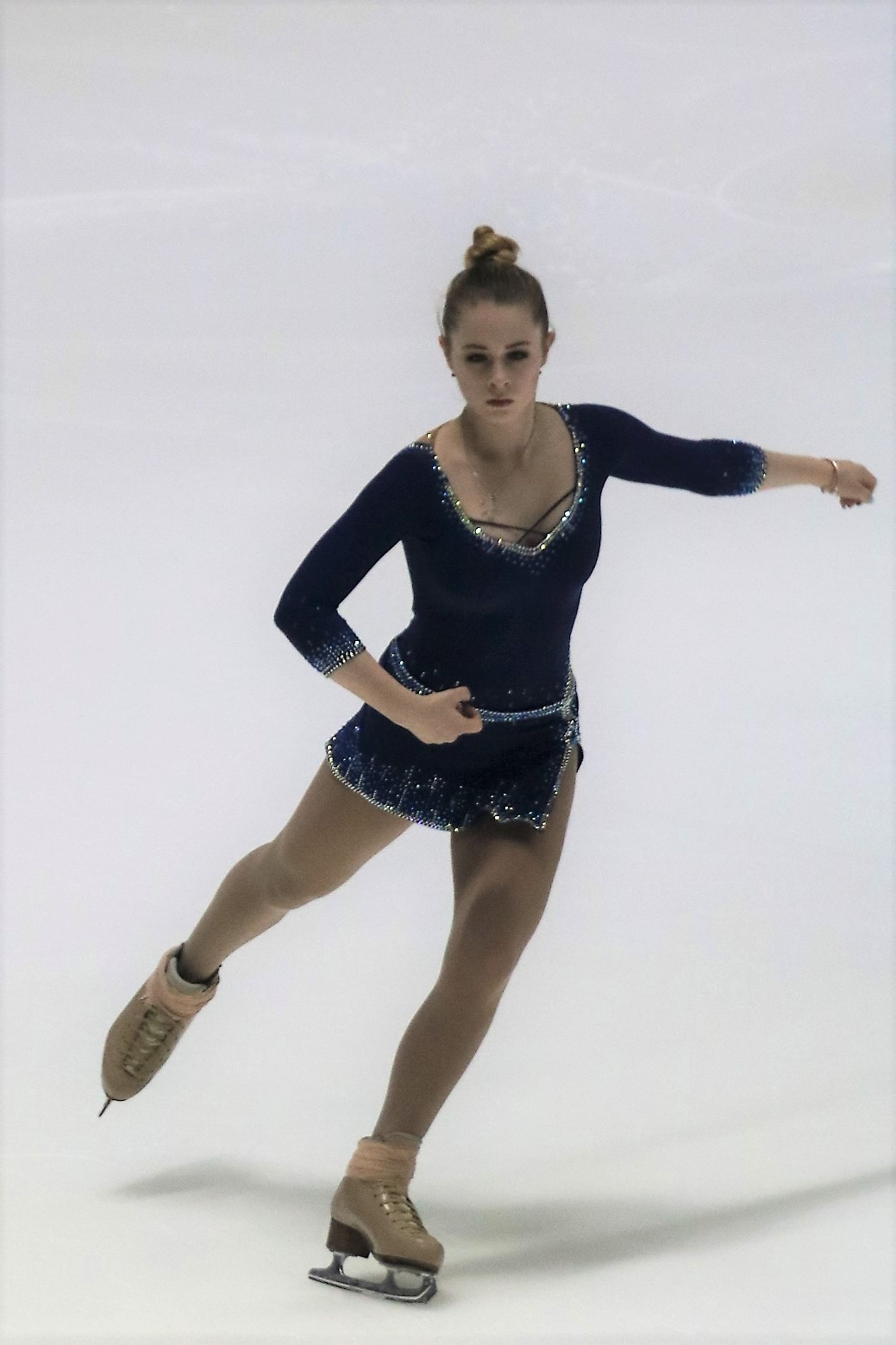 Дарья Паненкова (Россия) на Гран-при Хельсинки 2018.